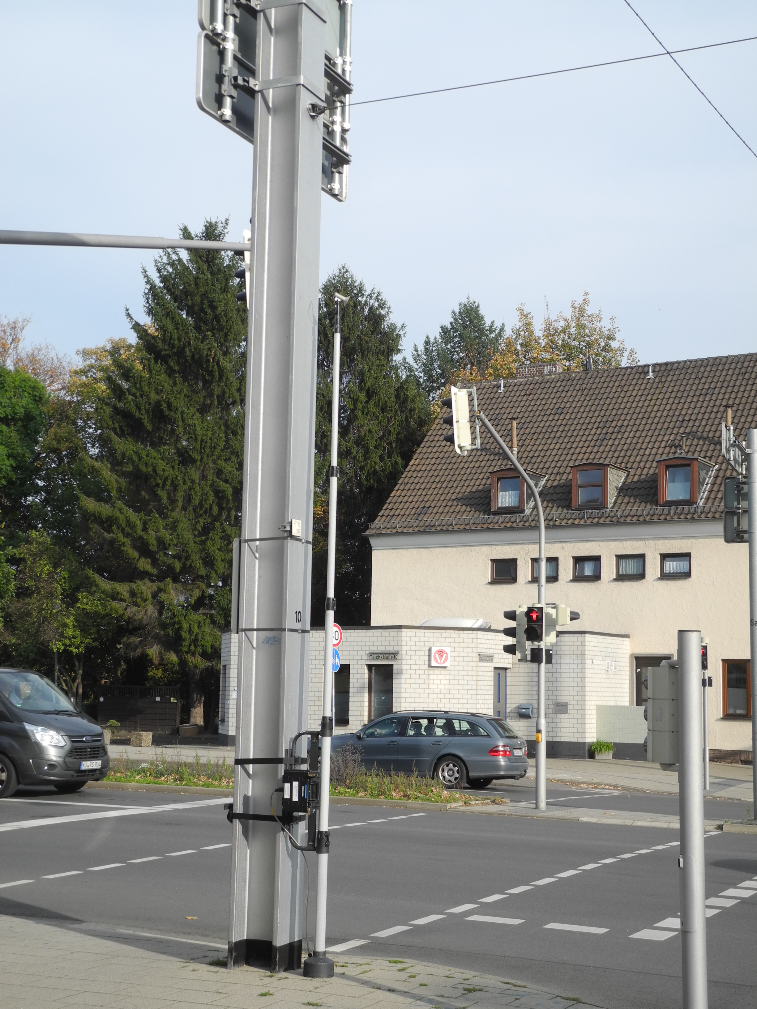 Verkehrszählung in Kassel, Hessen, Deutschland. Standort: Loßbergstraße, Ecke Teichstraße